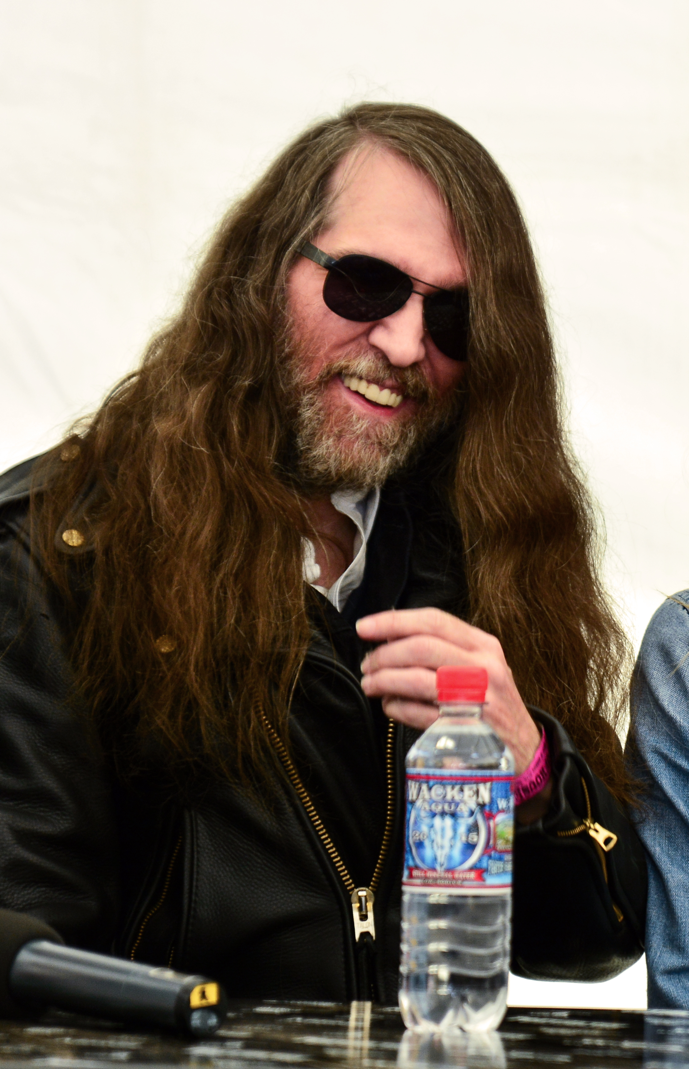 Paul O'neill von Savatage bei einer Pressekonferenz während des Wacken Open Air 2015